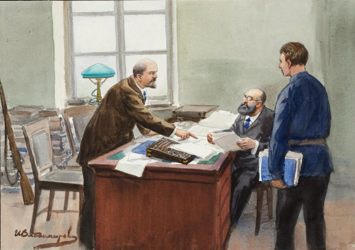 Встреча Н. Н. Кутлера с В. И. Лениным. Масло. Холст